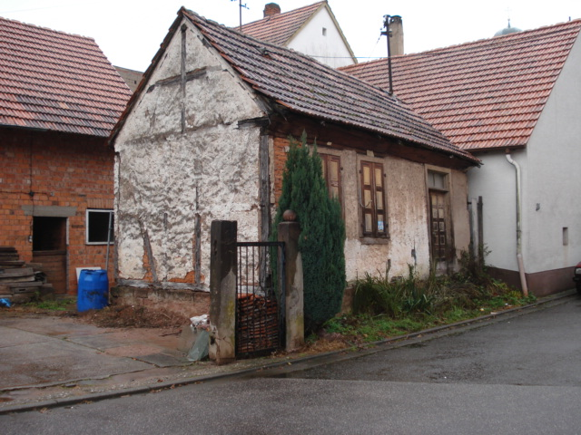 Mikwe in Busenberg (Rheinland-Pfalz)